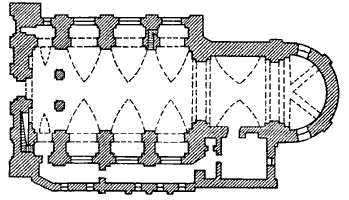 План францысканскага касцёла ў Пінску